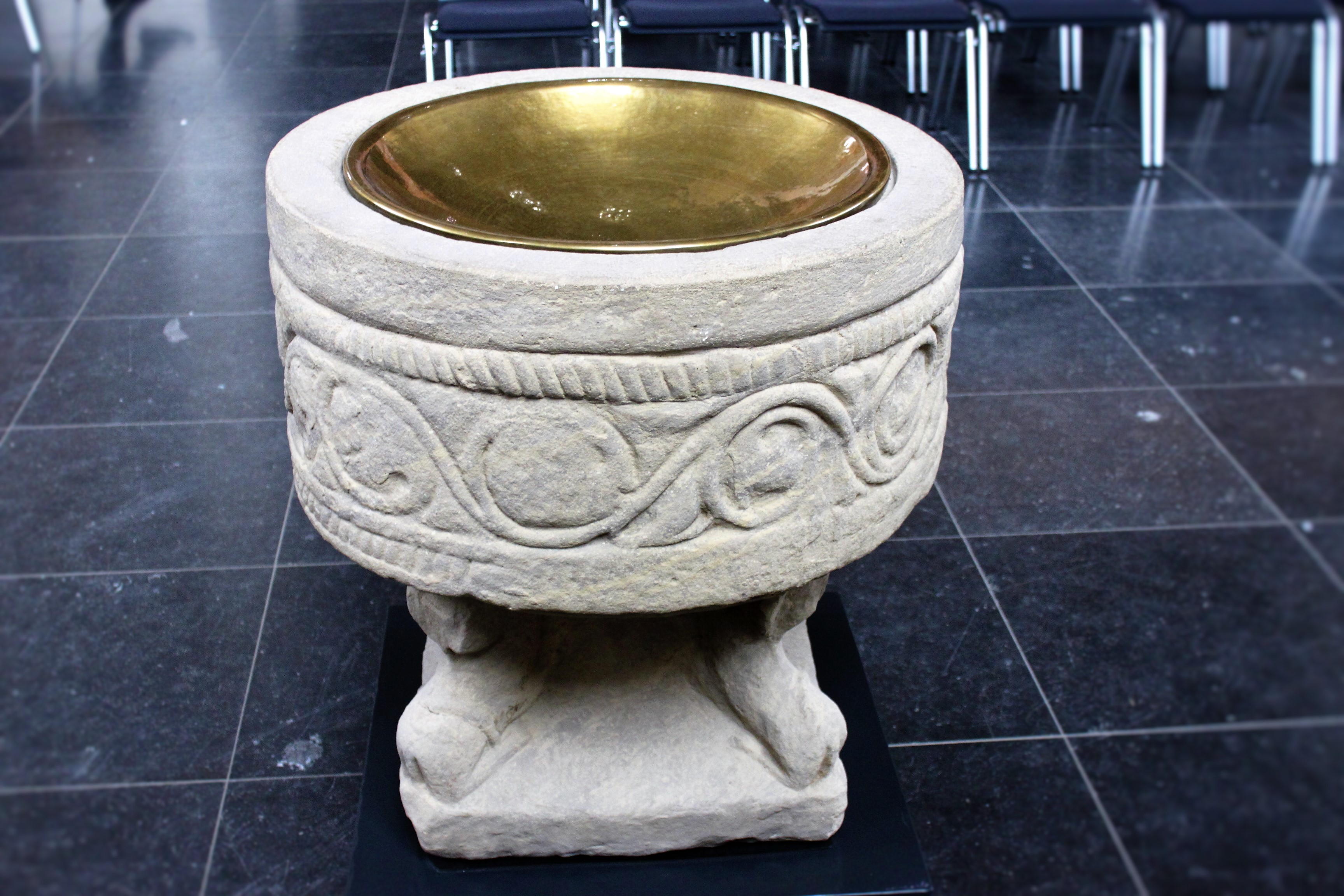 Neue Kirche in Emden, Ostfriesland, Niedersachsen, Deutschland